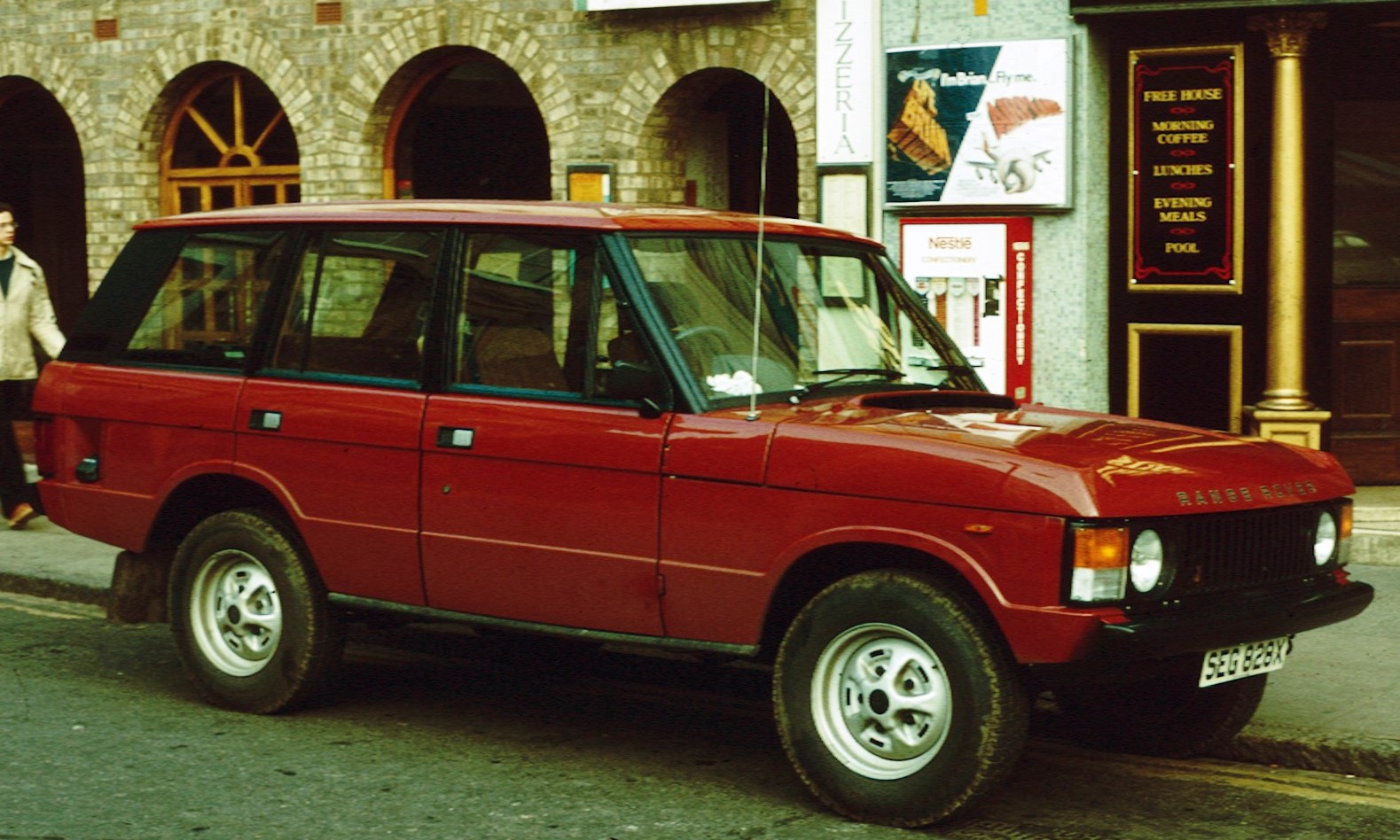 Range Rover 4 door Cambridge 1981